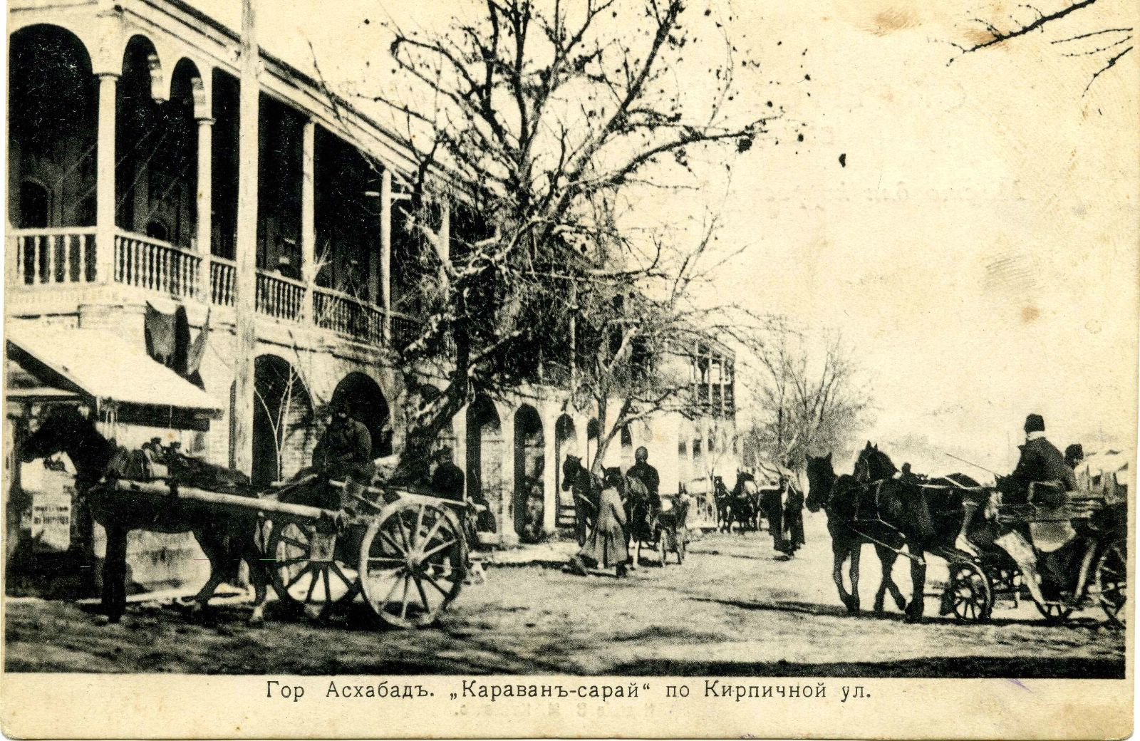 Азербайджанский караван-сарай/гостинница.